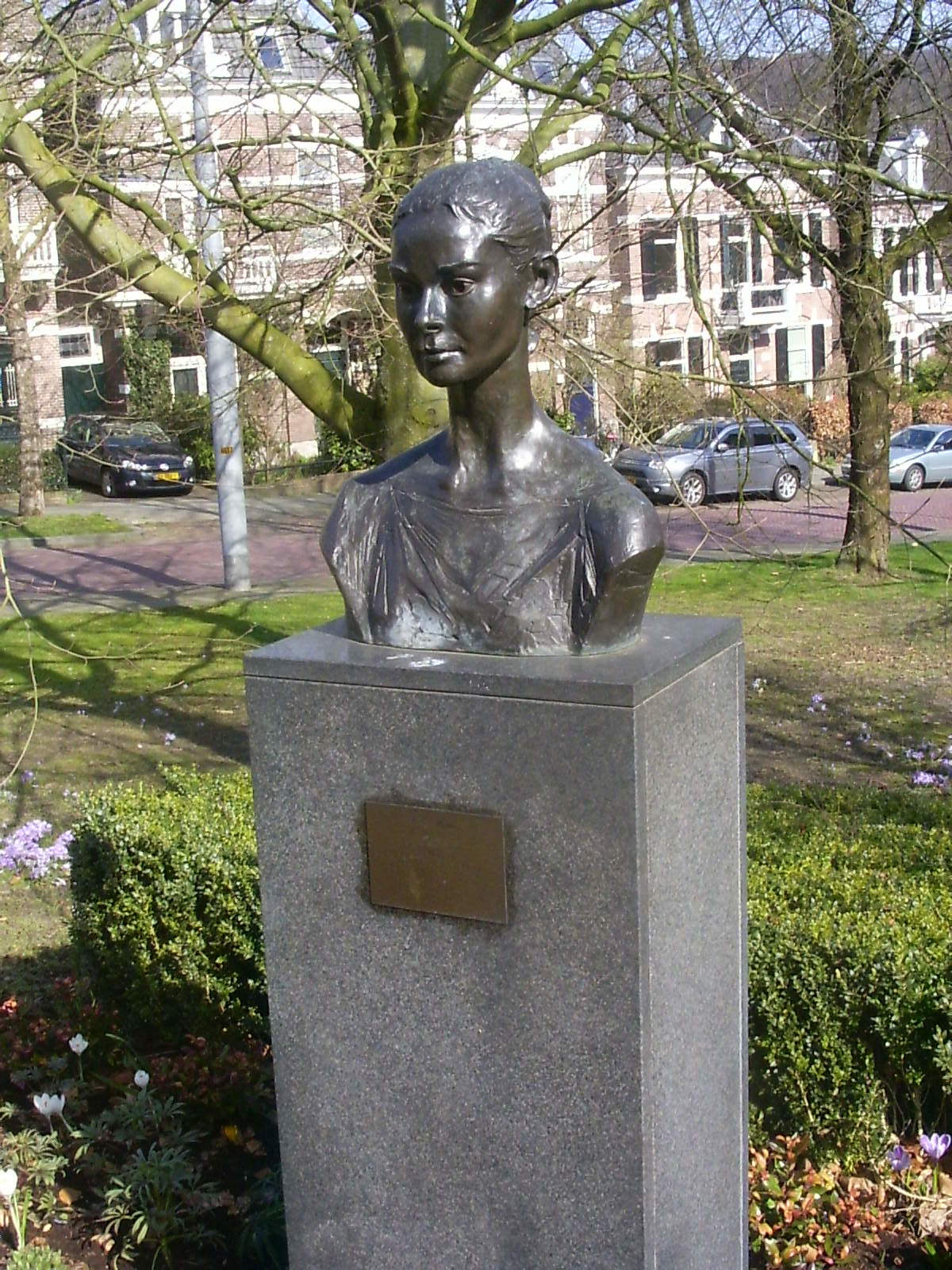 Arnhem, Burgemeestersplein, beeld van Audrey Hepburn